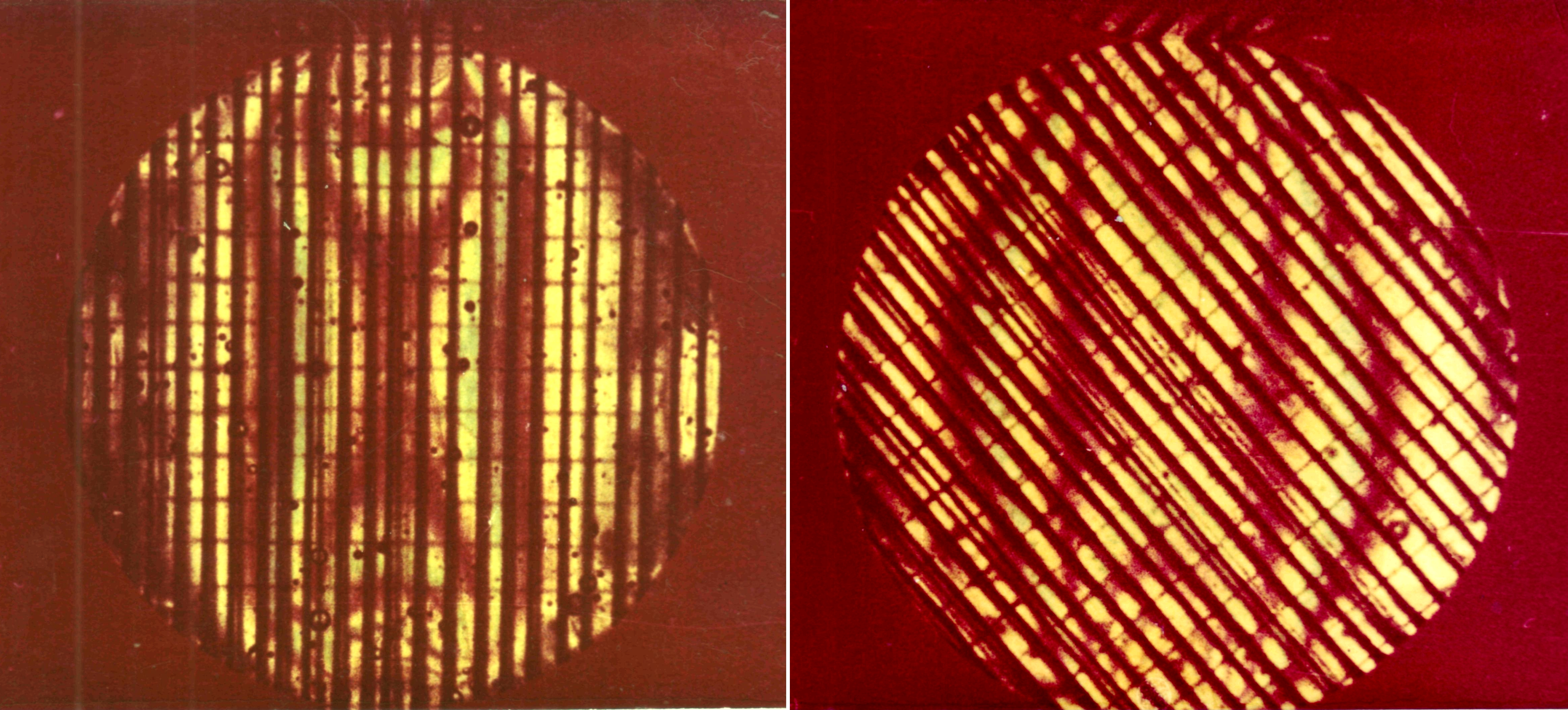 Фотографія розподілу напруження в анізотропних моделях поляризаційно-оптичним методом на лазерній установці. 1974 рік. Київський державний університет ім. Т. Г. Шевченка (І. Васильченко) та Інститут проблем лиття АН УРСР (О. Семенов) Photo stress distribution in the model anisotropic polarization-optical method for laser installation. 1974. Kyiv State University. Shevchenko (I. Vasil'chenko) and the Institute of Problems of casting Academy of Sciences of the USSR (O. Semenov)